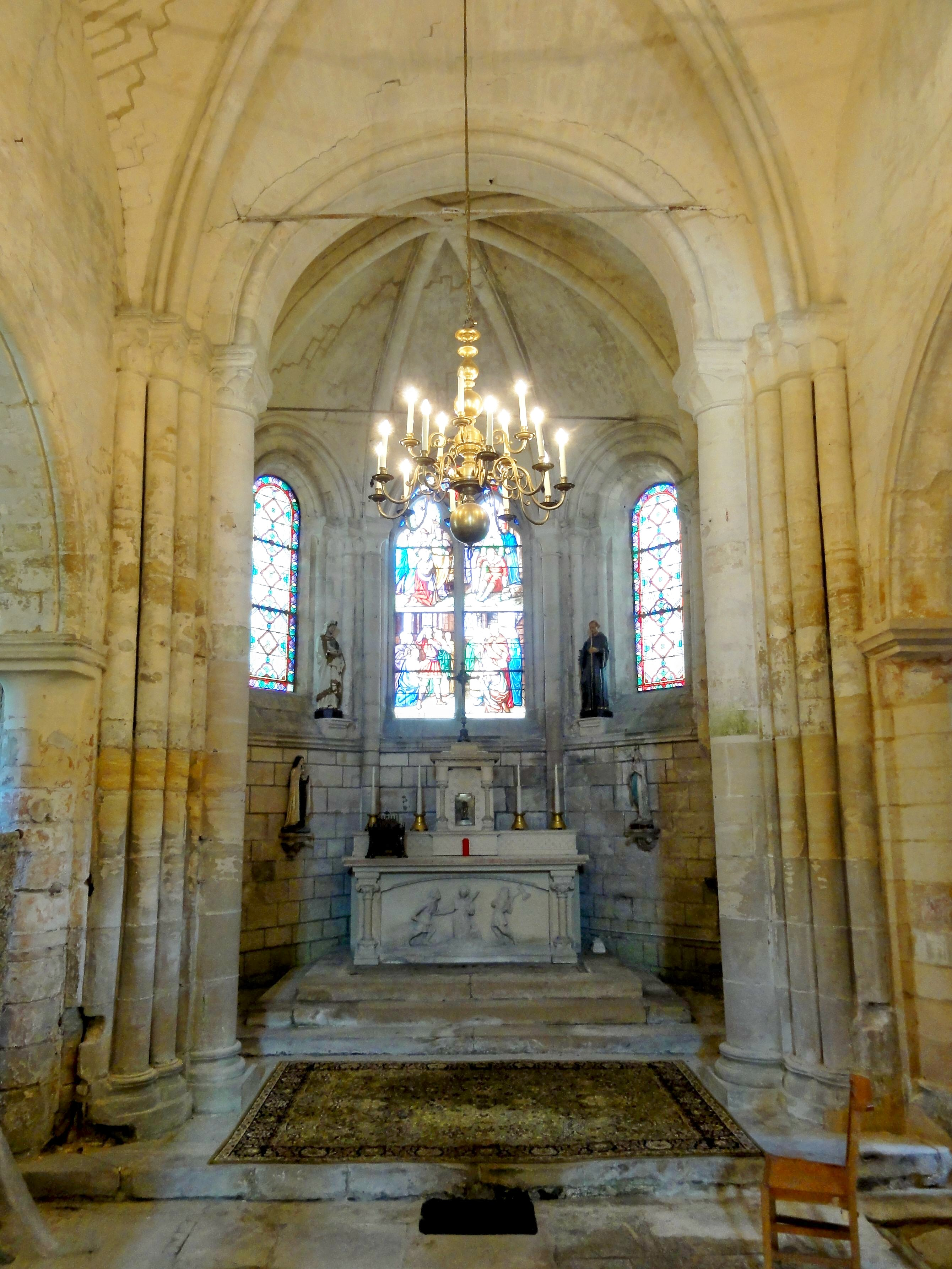 Base du clocher, vue vers l'est.